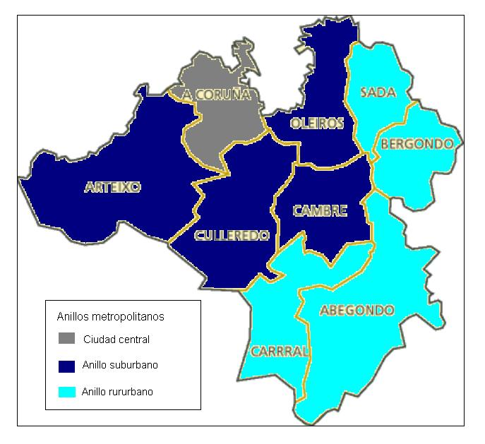 Mapa de los anillos metropolitanos de La Coruña, España